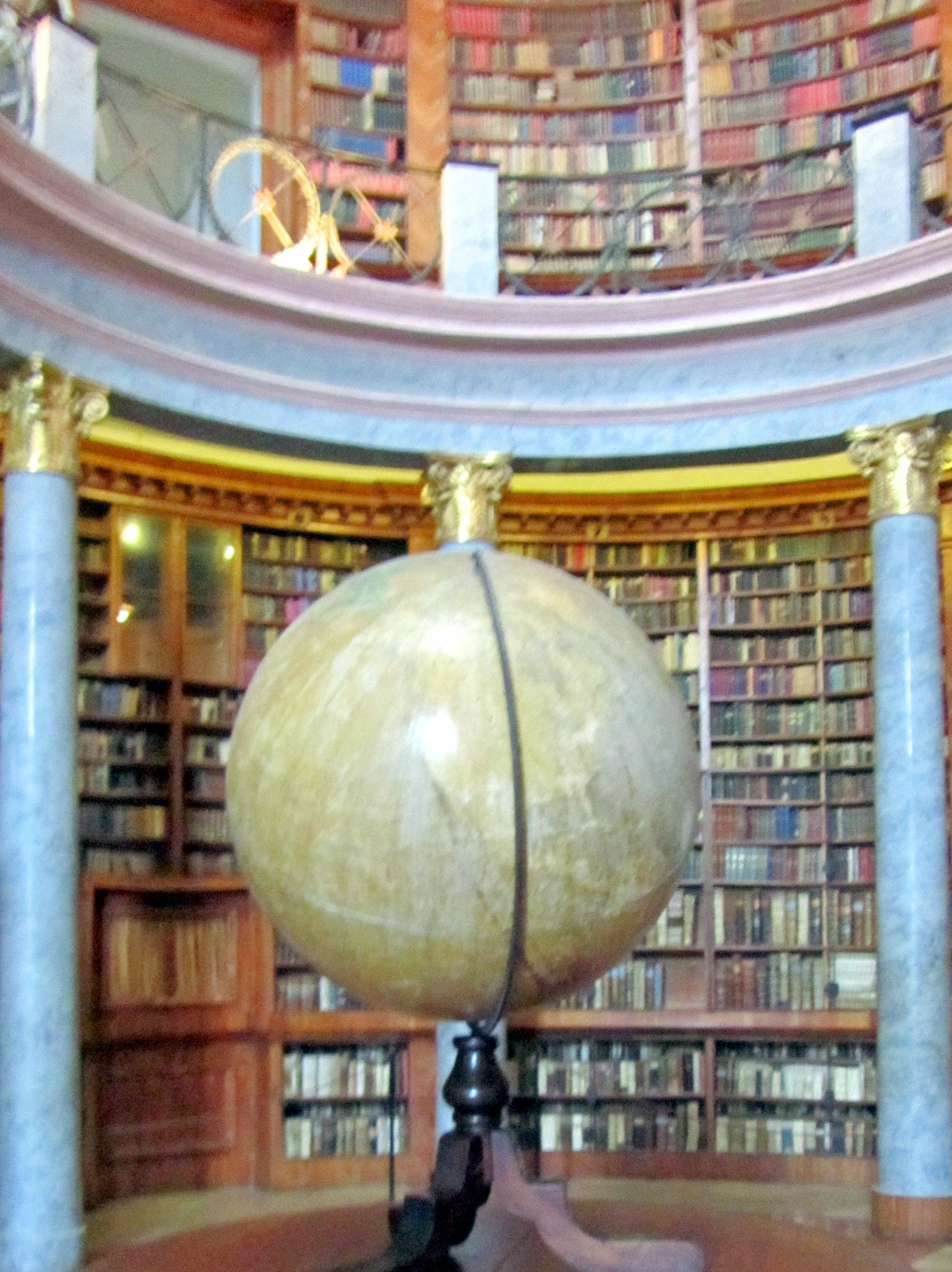 Bencés főapátsági templom (Pannonhalma, Várkerület 1 .) This is a photo of a monument in Hungary. Identifier: 4640